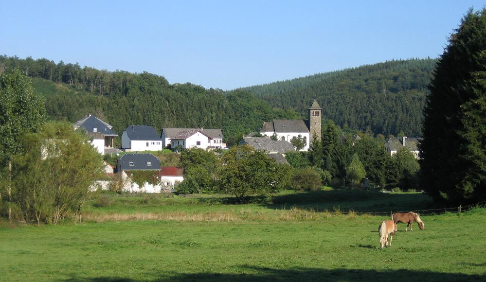 Vue vum ënneschten Deel vun Drauffelt. Foto vum Pear 17:46, 8 September 2006 (UTC) 08.09.2006. Draufelt